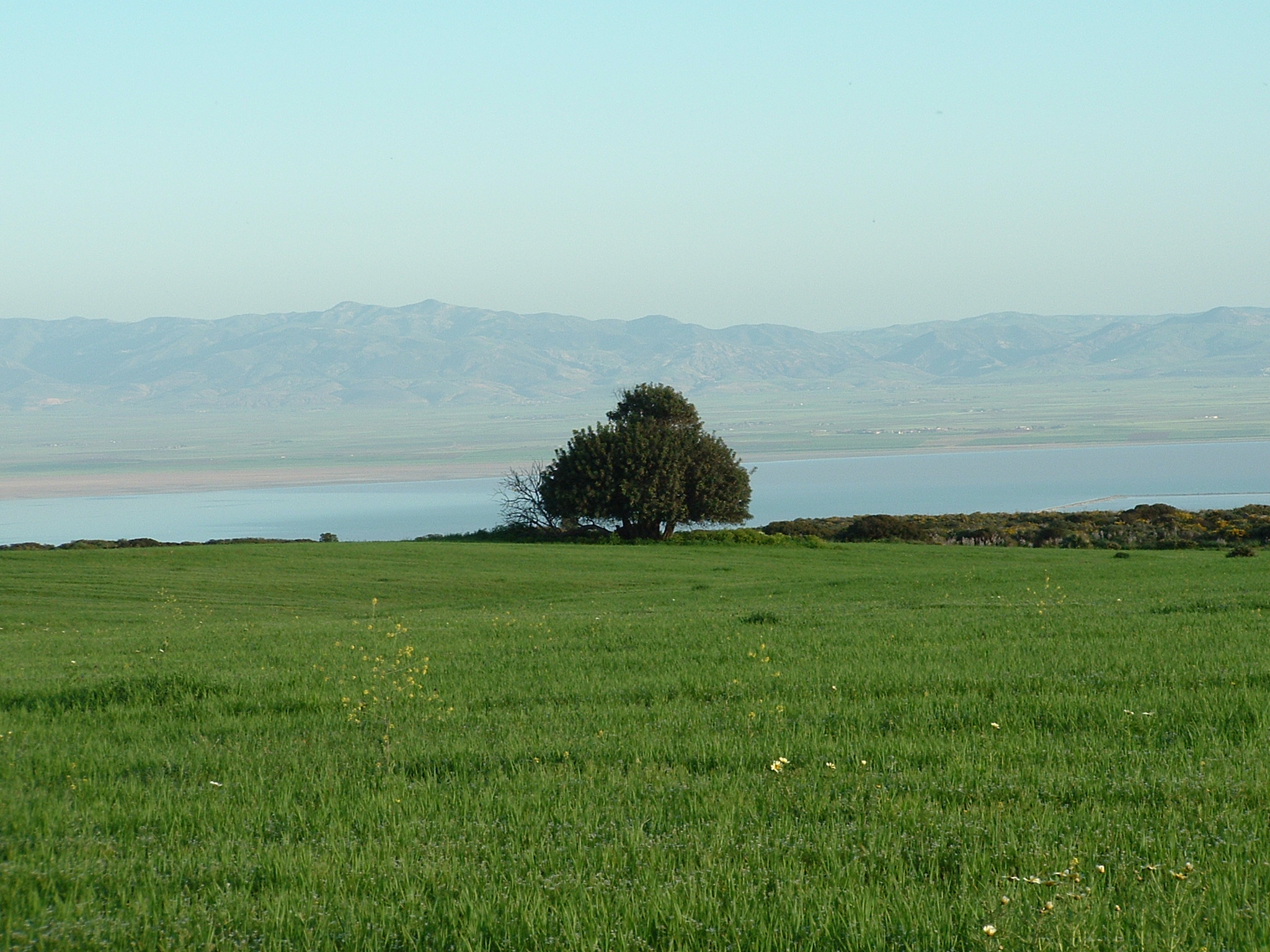 La Sebkha se trouve au sud-ouest d'Oran , celle-ci a pris de l'ampleur ces dernières années se trouvant ainsi entre trois Wilaya (Préféctures) Sidi Bel Abess , Aîn Témouchent et Oran